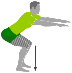 Schematische Darstellung einer Kniebeuge